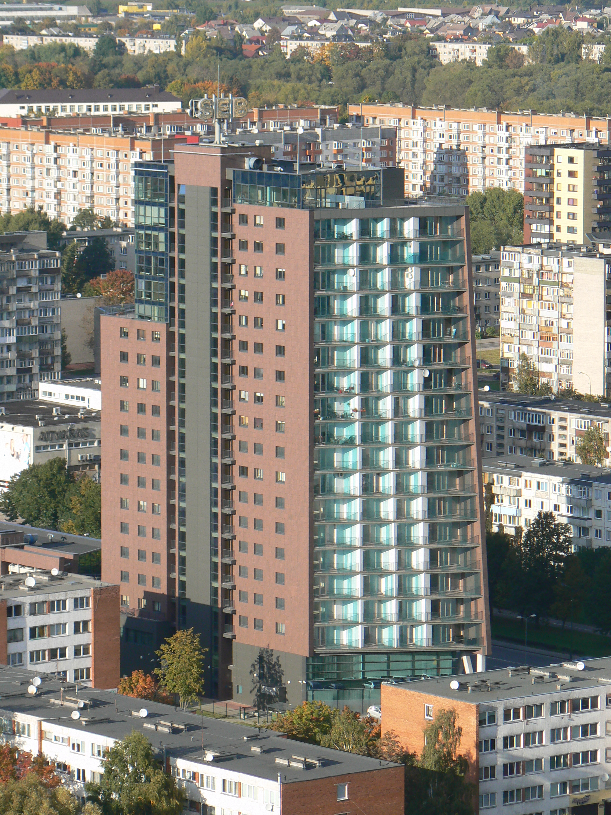 Banka SEB (dříve Vilniaus, zkratka z Skandinaviska Enskilda Banken), Taikos pr. 32A v Klaipėdě, pohled z Pilsotu směrem k severovýchodu. Souřadnice jsou budovy banky, nikoliv stanoviště fotografaLietuvių: SEB bankas Klaipėdoje iš Pilsoto